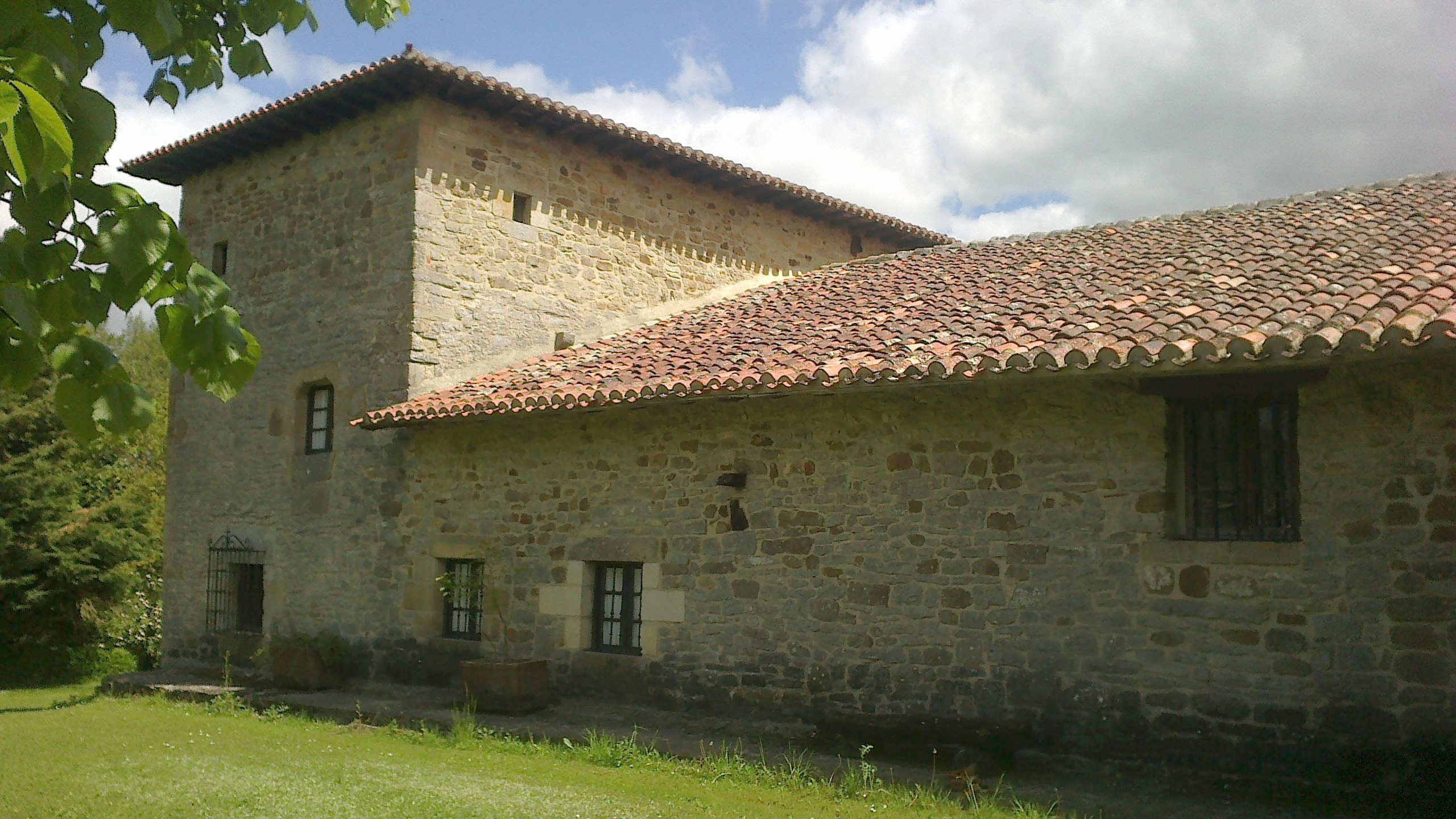 Lazarraga dorrearen atzealdea